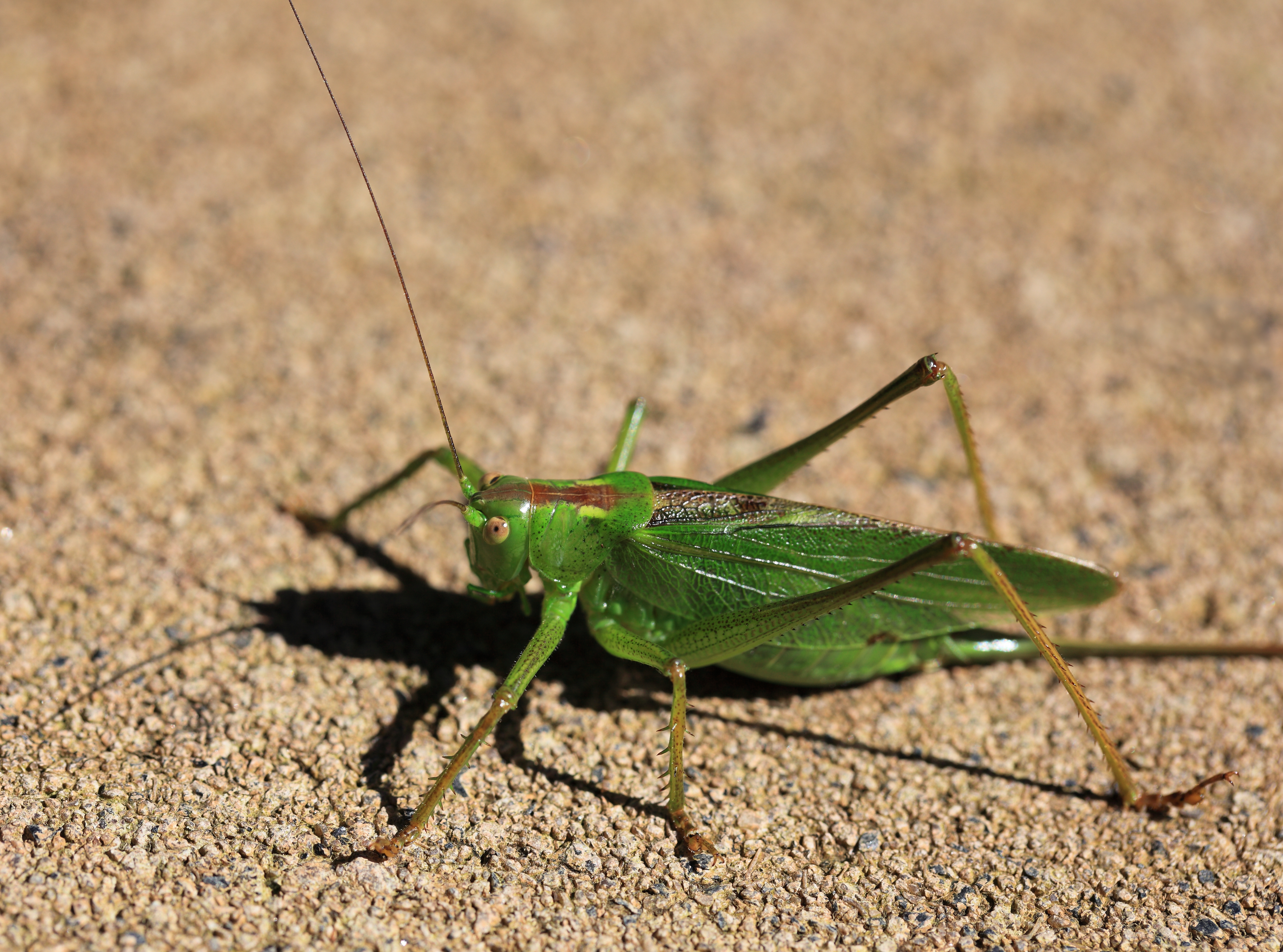 ヤブキリの雌 〔♀〕 の成虫。栃木県那須町にて。